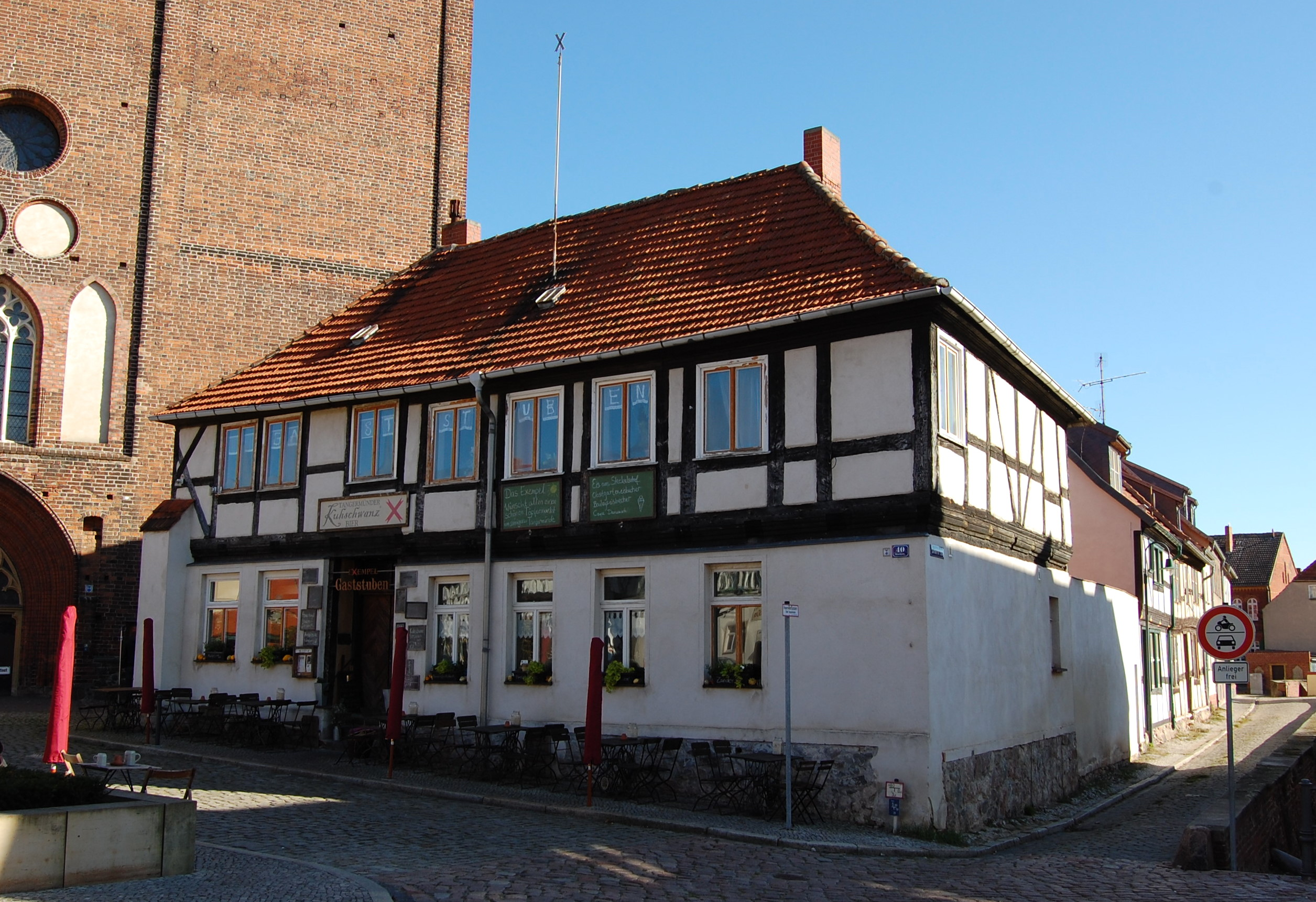 Exempel Gaststuben in der Kirchstraße 40 in Tangermünde, ehemaliges Schulhaus